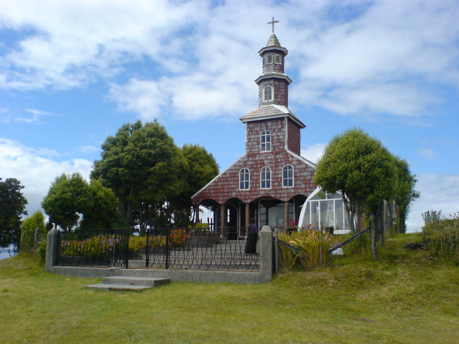 Una iglesia chica a poca distacia de Chacao, hacia el este. (Chiloé, Chile)